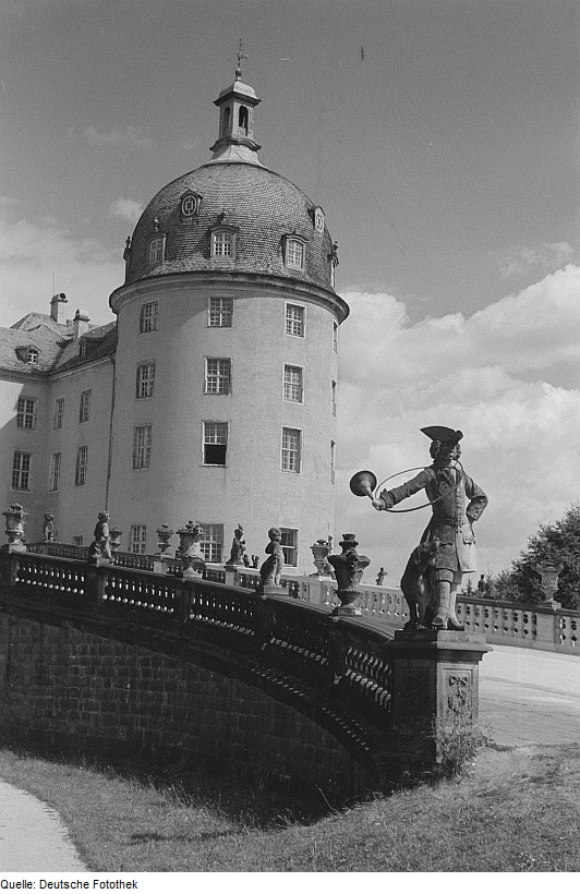 Original image description from the Deutsche FotothekAnsicht des Amtsturmes mit einer im Vordergrund stehenden Skulptur eines Jägers mit einem Parforcehorn